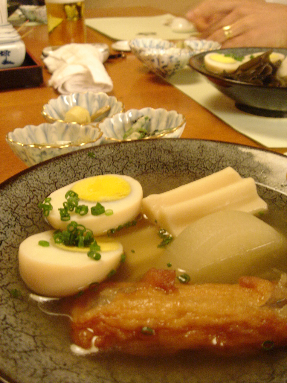 at riki, tokyooden